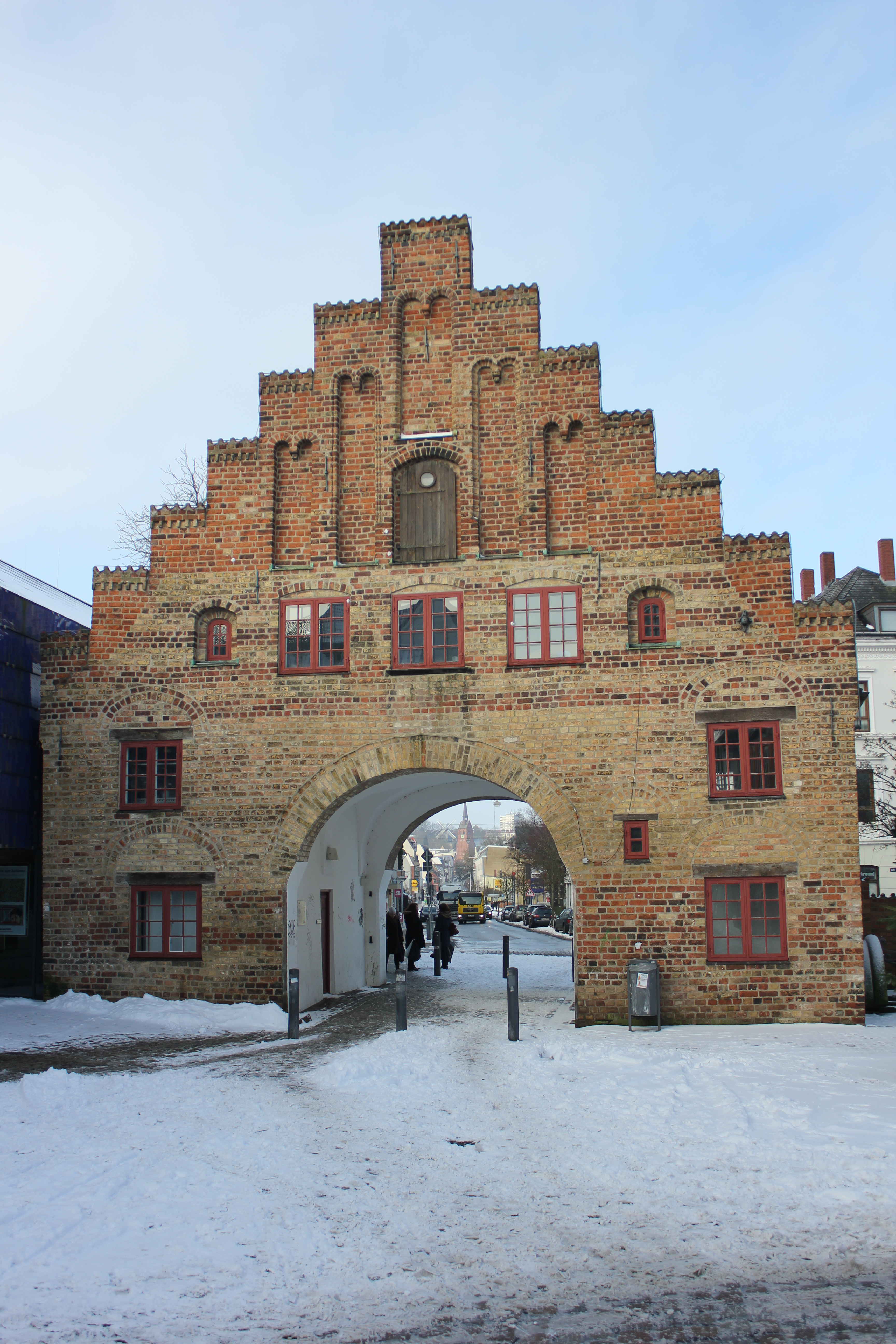 Nordertor im Schnee (Flensburg, Januar 2014)